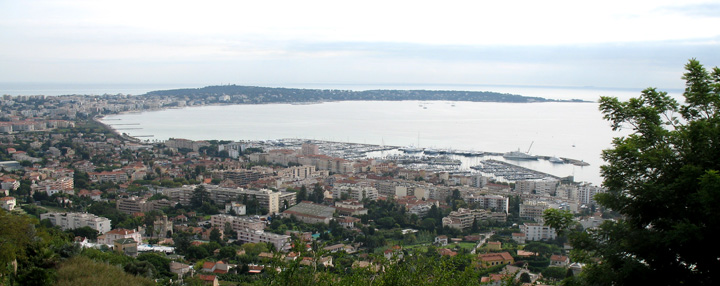 Vallauris et le golfe Juan, PACA, France